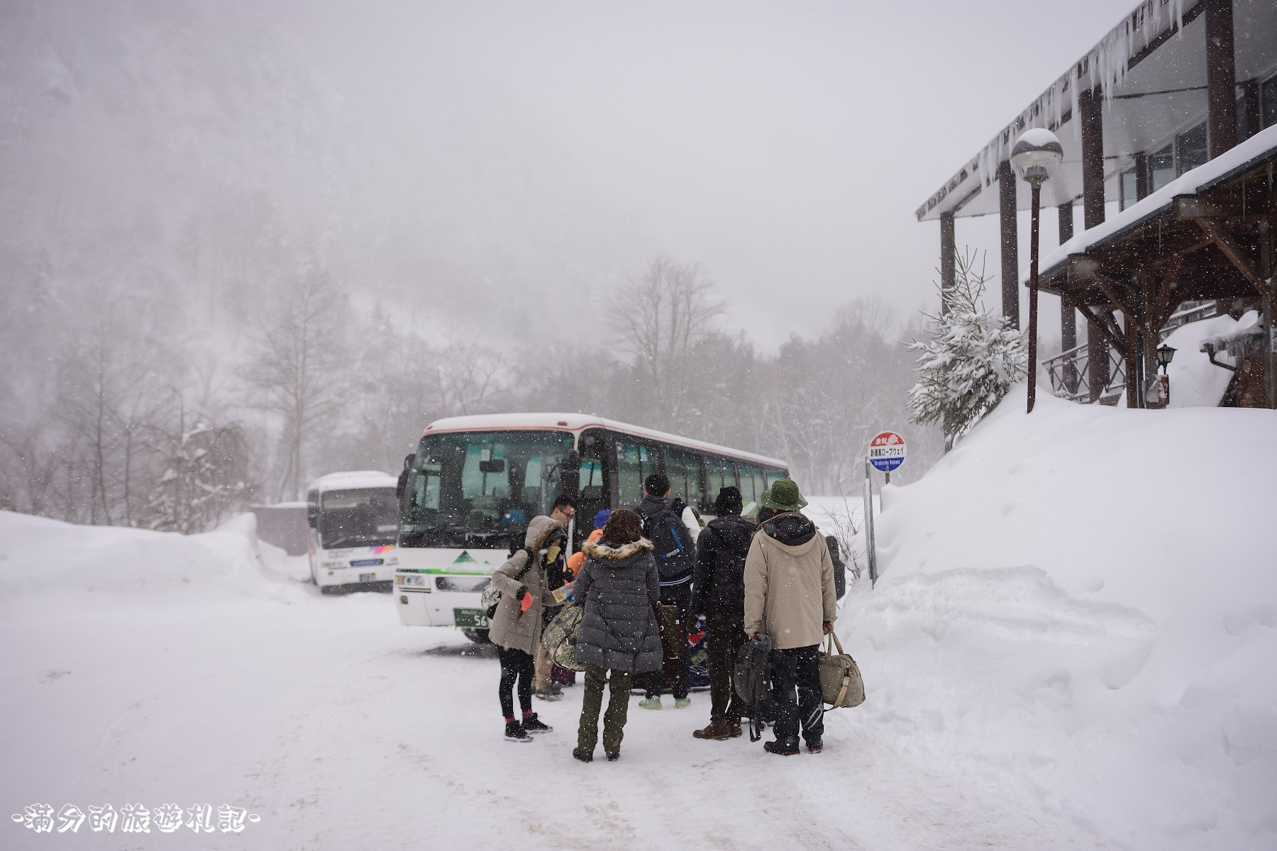 【日本。岐阜】新穗高